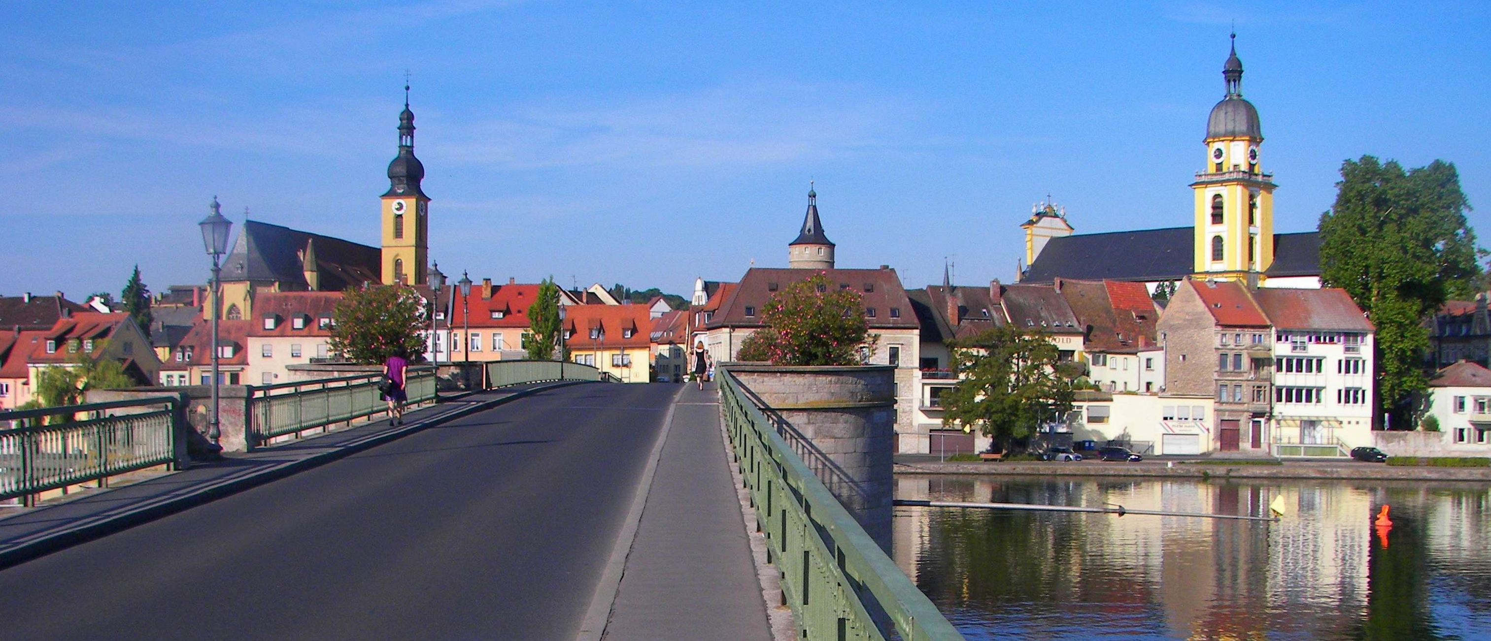 Kitzingen, Blick über die Alte Mainbrücke auf die Stadt